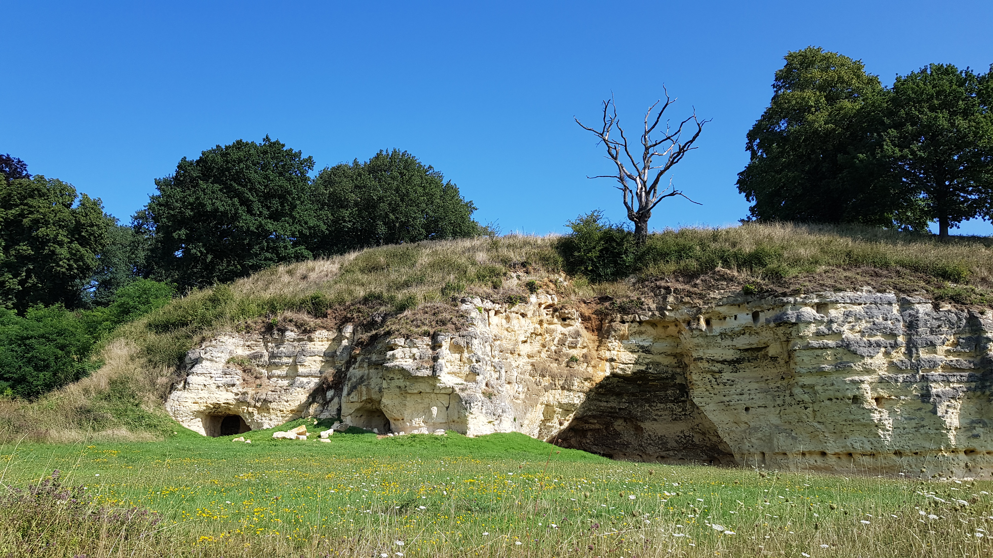 Däölkesberg, Oud-Valkenburg, Valkenburg aan de Geul, Nederland